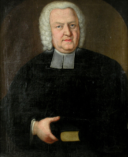 Portrait des Johann Christoph Fischer, Stadtpfarrers in Öhringen, 1751